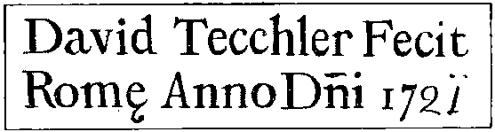 Signature David Tecchler - 1721